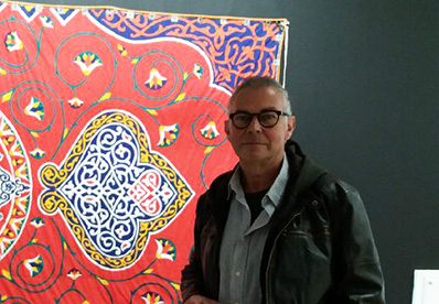 Photo de l'artiste